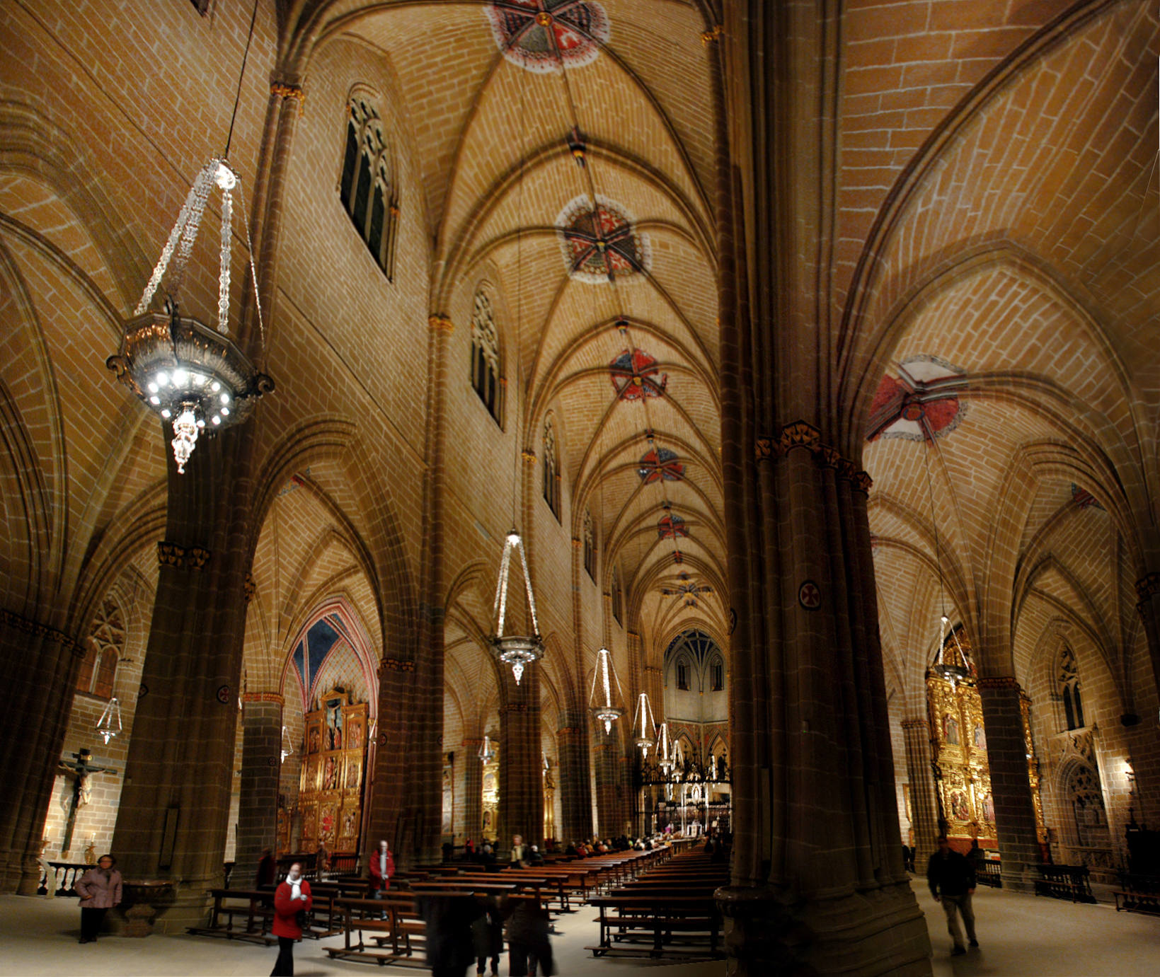 Interior de la catedral de Pamplona (fotocomposición a partir de varias fotografías)